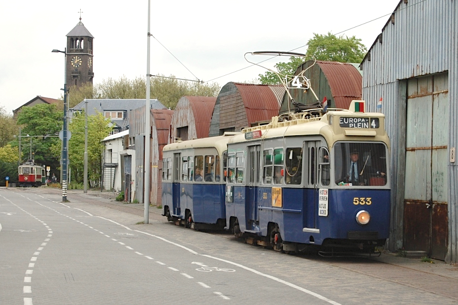 NL: Amsterdamse Drieasser motorwagen 533 en bijwagen 987 (bouwjaar 1950) op de Electrische Museumtramlijn Amsterdam bij het Haarlemmermeerstation. En: Old Amsterdam tram 533 and 987 (1950) on the Electrische Museumtramlijn Amsterdam, at Haarlemmermeerstation.